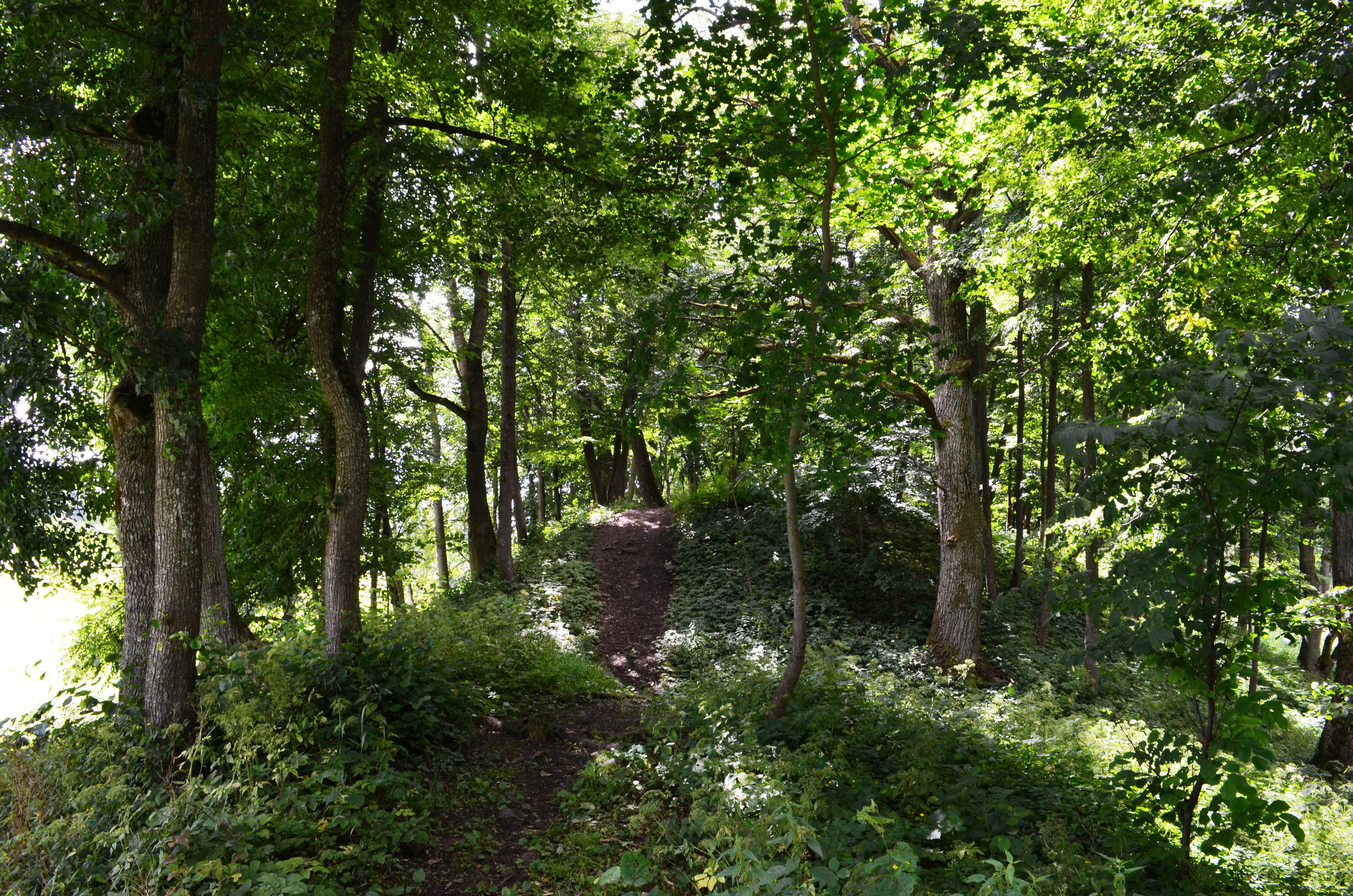 Čičinsko kalnas, Upytė, Panevėžio raj.